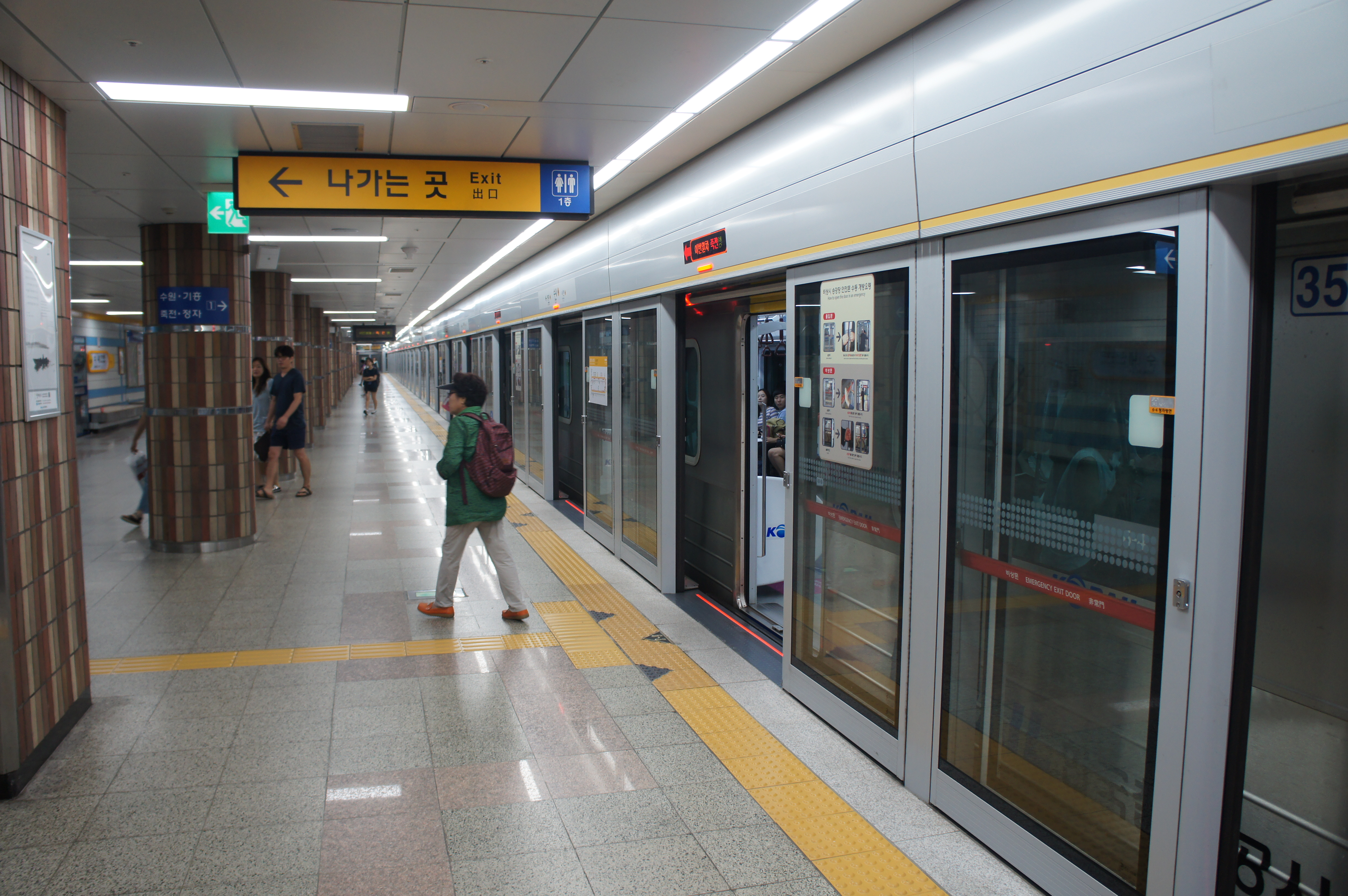 수내역 승강장